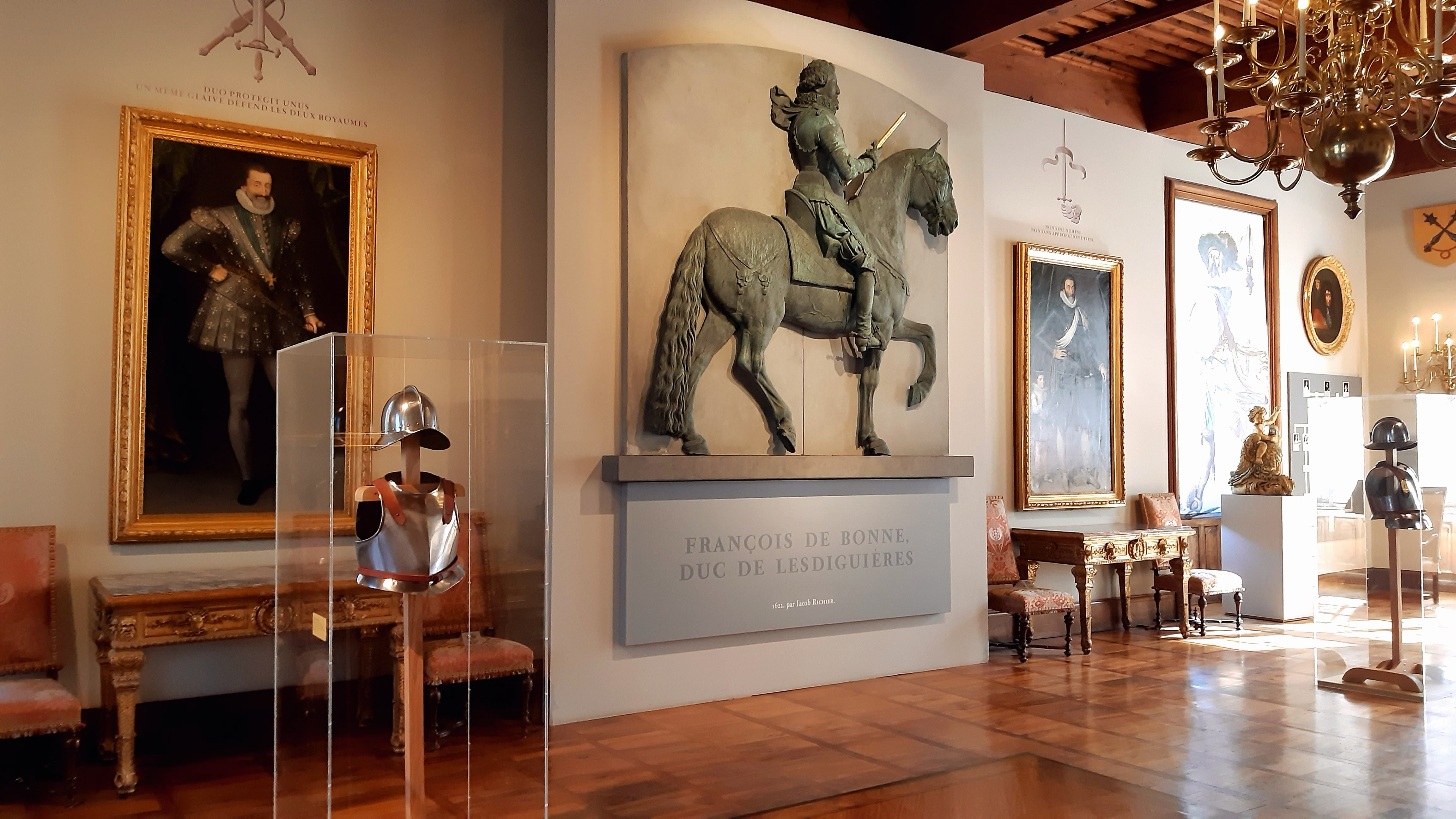 Musée de la révolution Française dans le château de Vizille, près de Grenoble. (salle Lesdiguières)